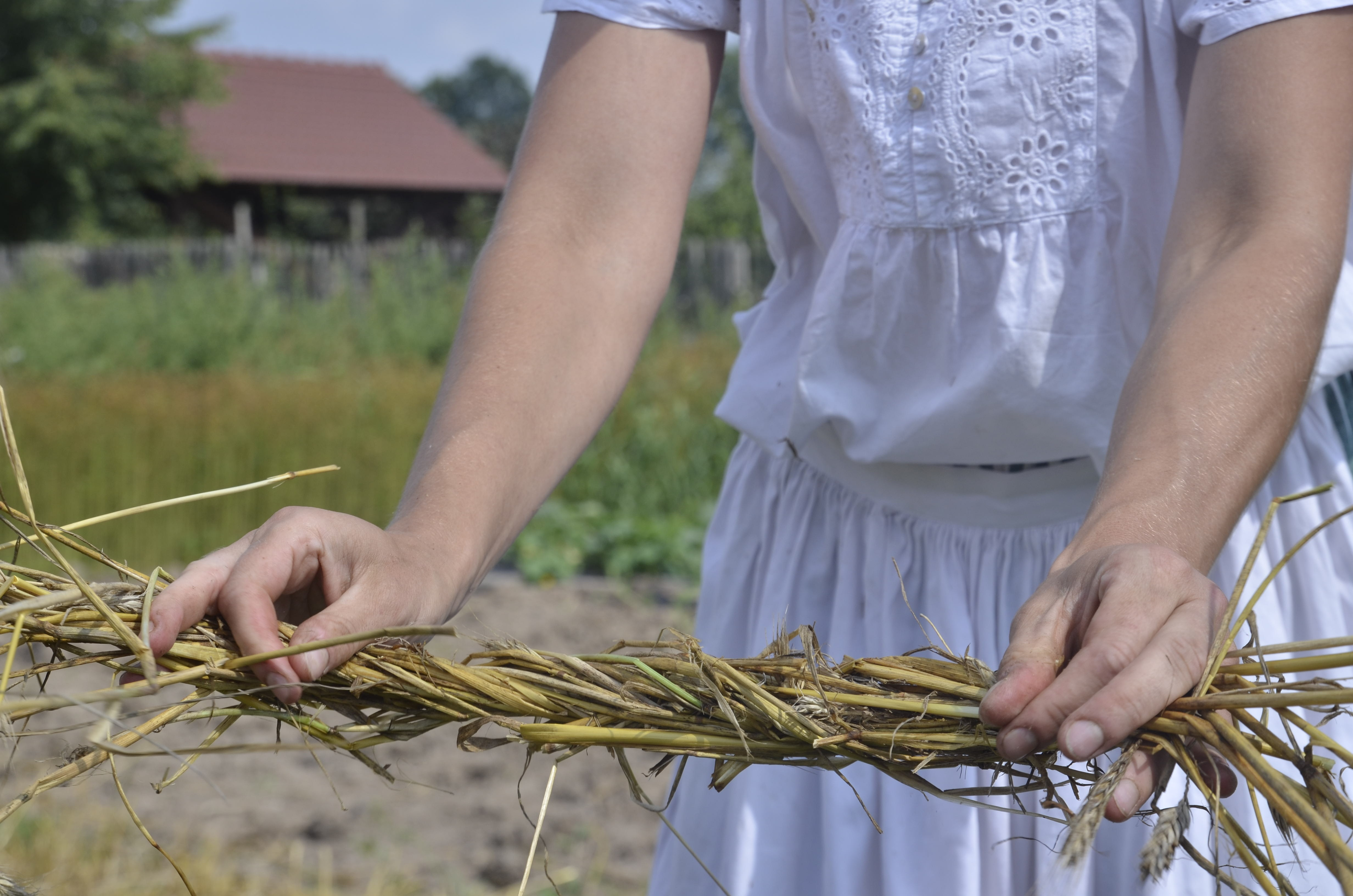 povříslem se svazovaly snopy obilí